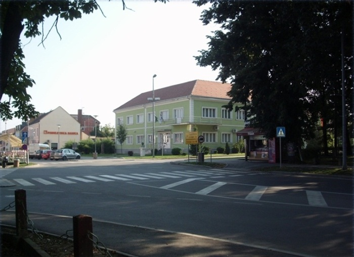 Zgrada pleternicke opcine